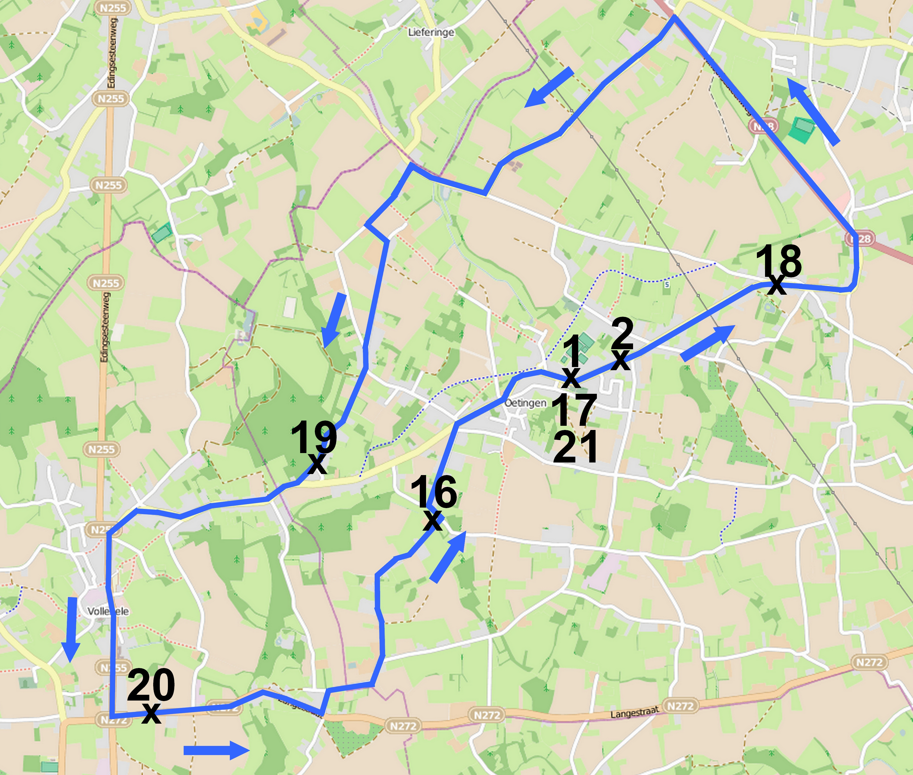 Reportage photographique réalisé le mercredi 25 juin à l'occasion du départ et de l'arrivée de l'Internationale Wielertrofee Jong Maar Moedig 2014 à Oetingen (Gooik), Belgique.